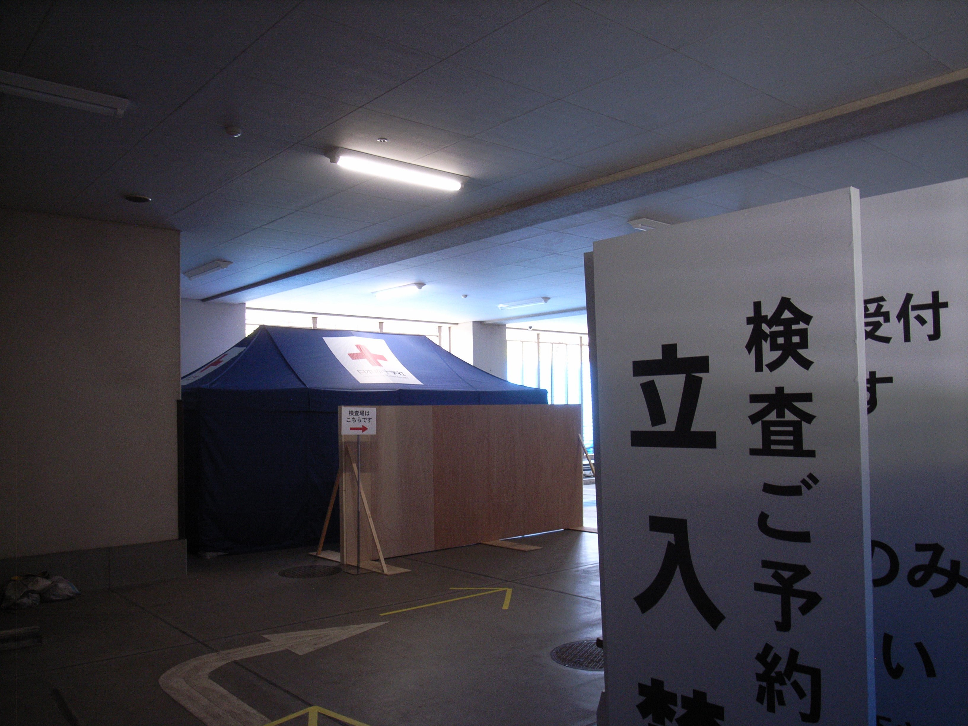 都内に設置されたPCR検査センター